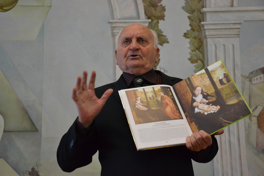 Лекція професора Володимира Овсійчука для студентів Острозької академії